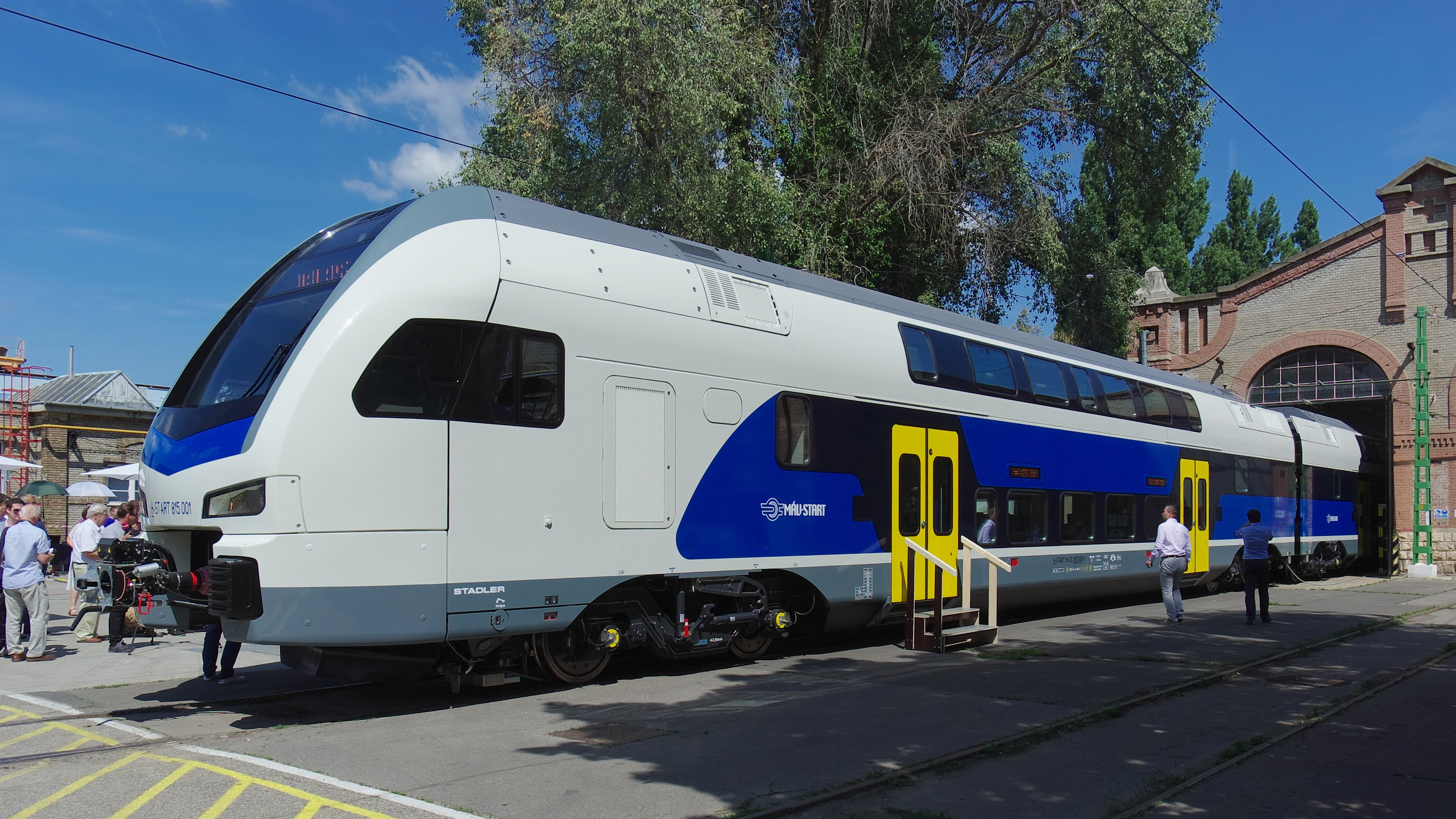 A MÁV-csoport számára készült első Stadler KISS a hivatalos kigördítésen a Dunakeszi Járműjavítóban. Der erste Stadler KISS Triebzug der MÁV-Gruppe bei der feierlichen Rollout in der Waggonfabrik Dunakeszi. The first Stadler KISS for MÁV Group on the official roll-out in the carriageworks in Dunakeszi